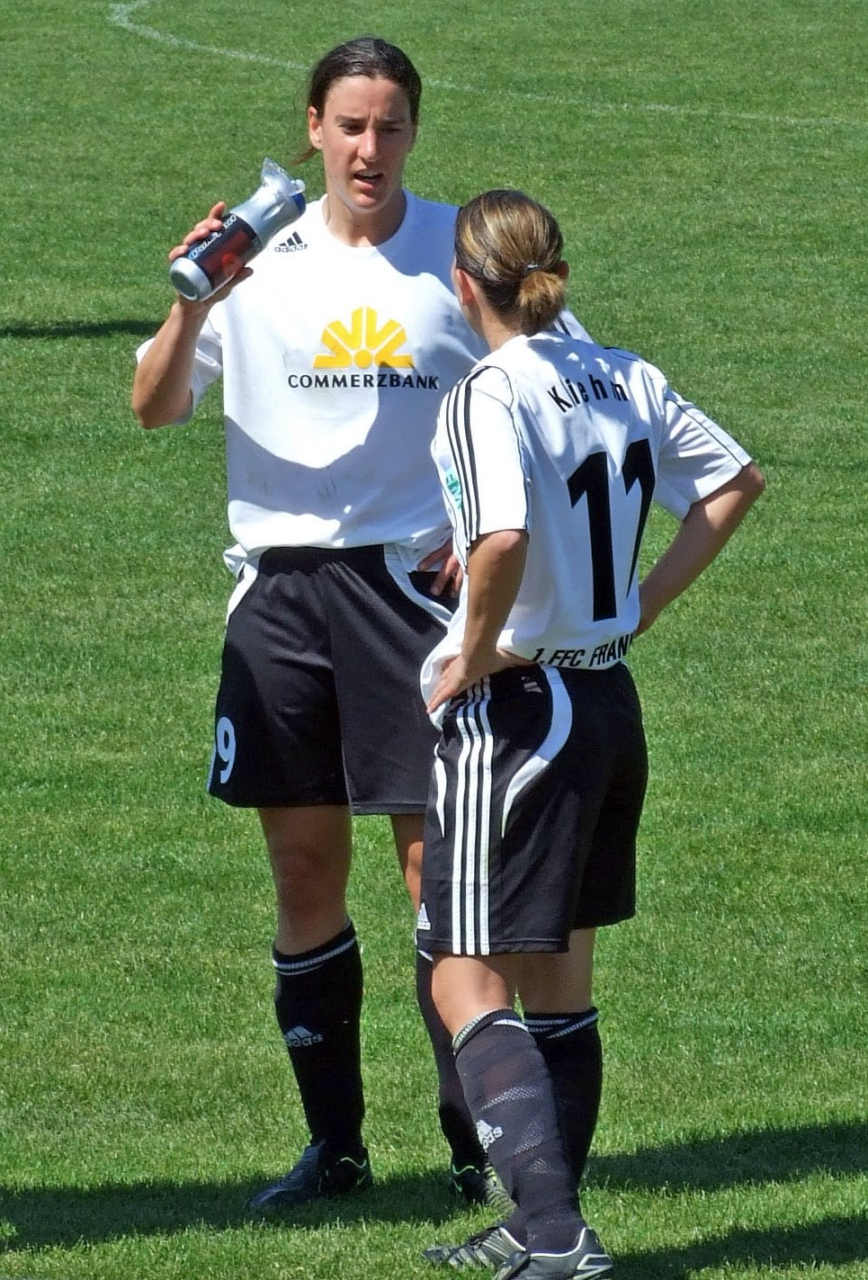 Birgit Prinz vom 1.FFC Frankfurt, 2008